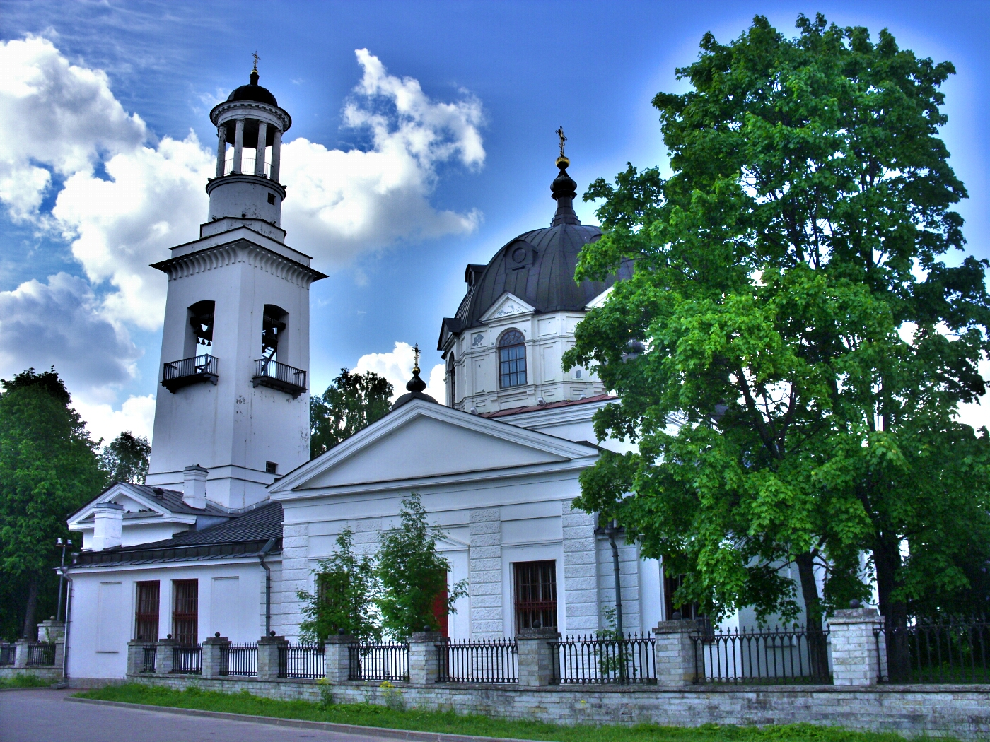 15 июля 1990 года, в 750-летнюю годовщину Невской битвы, восстановленная церковь была передана Русской православной церкви; освящена 12 сентября 1995 года.